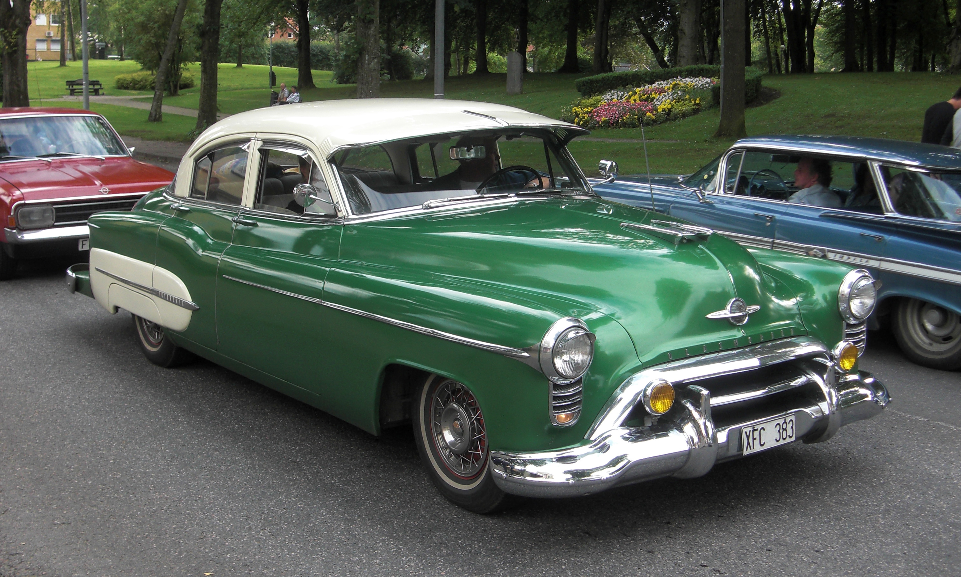 En Oldsmobile 1950 på cruising på Ströget (Sankt Olofsgatan) i Falköping 2010-07-31